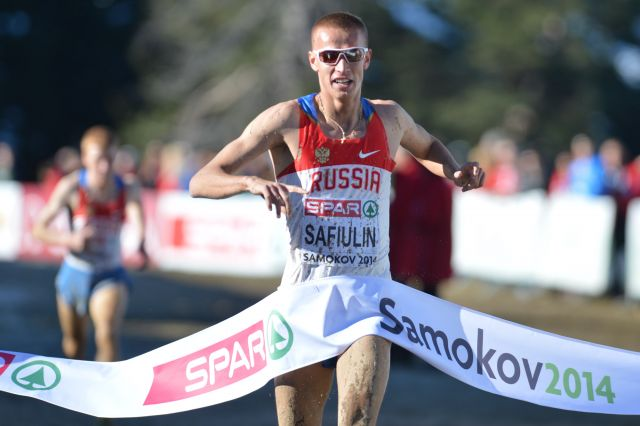 Ильгизар Сафиуллин выигрывает чемпионат Европы по кроссу 2014 года в забеге среди молодёжи